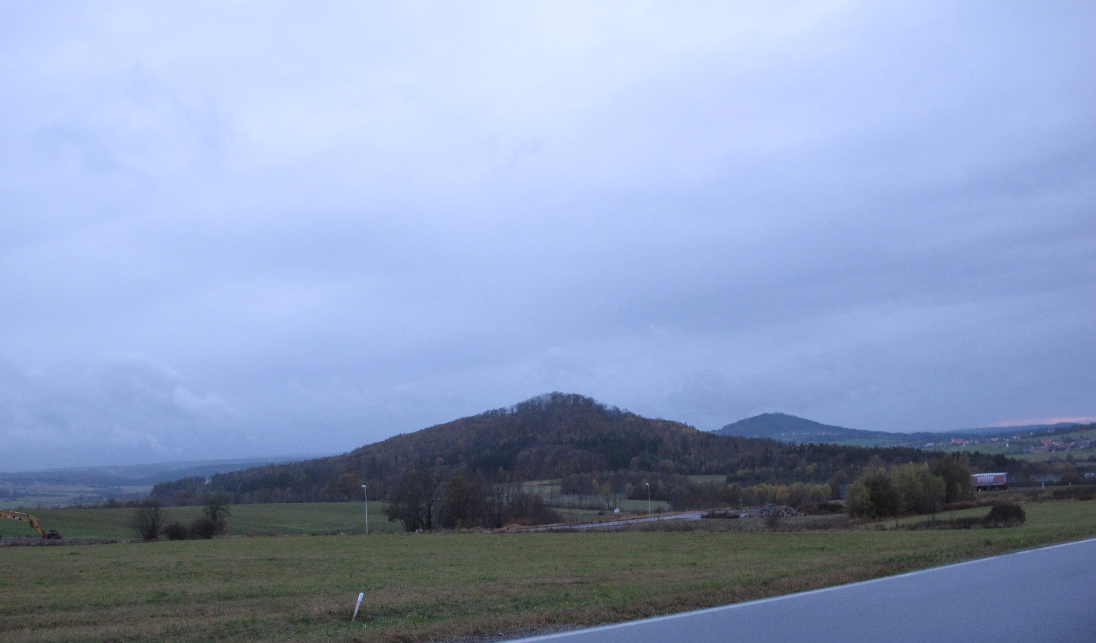 Mettermich und Dreistelzberg von Schildeck aus gesehen.